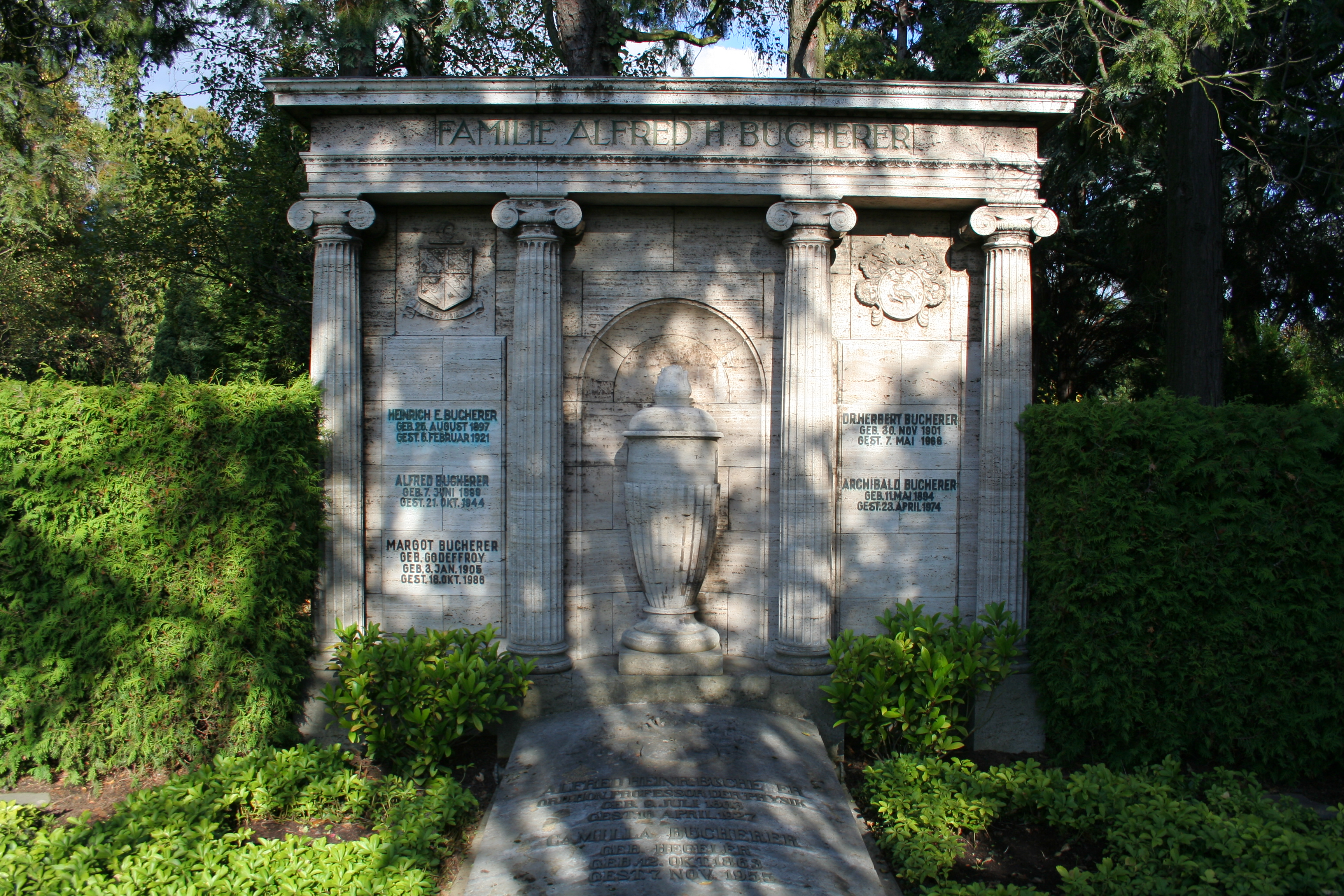 Der Südfriedhof in Bonn. Grab von Alfred Bucherer.